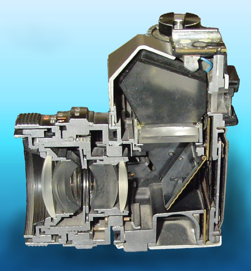 Spiegelreflexkamera Praktika L2